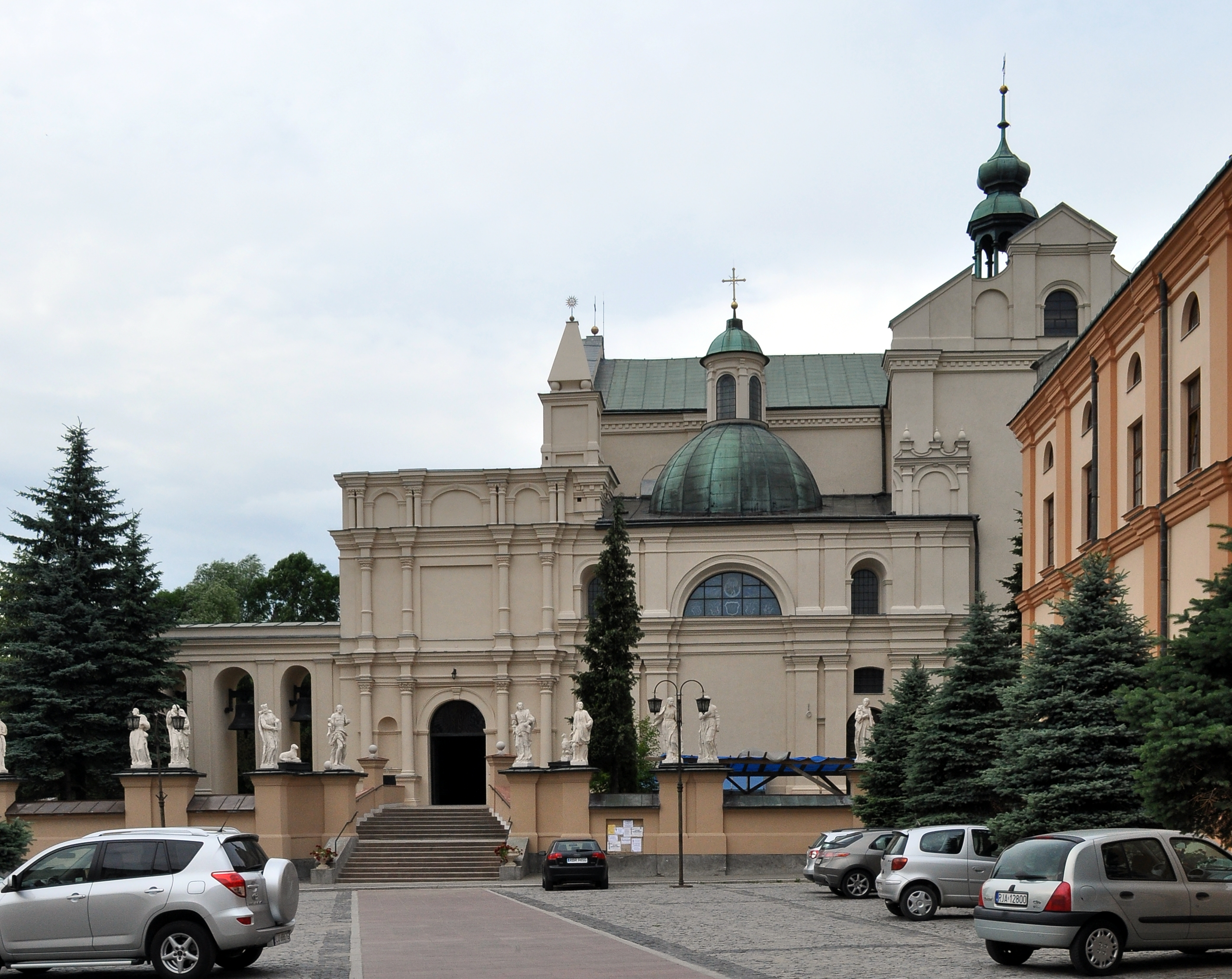 Kolegiata Bożego Ciała w Jarosławiu